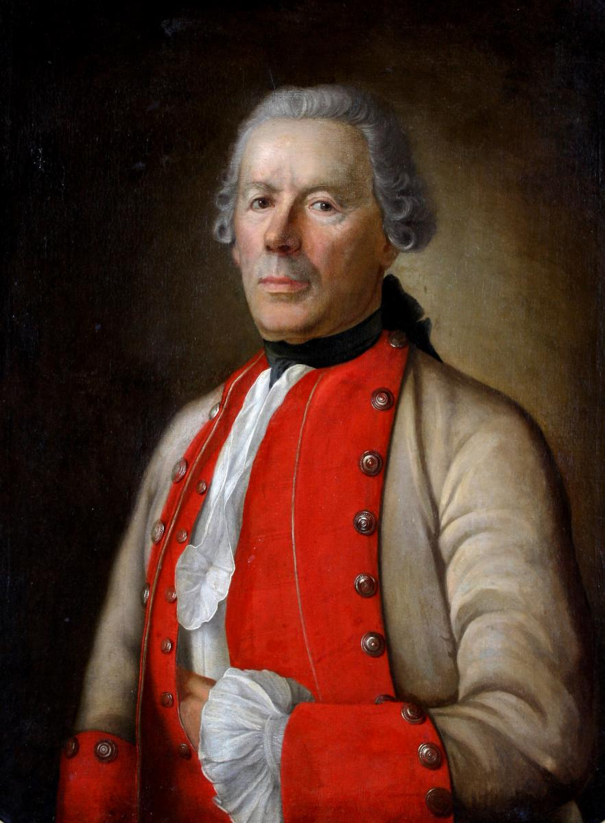 Duque de Beaumont y Príncipe de Tingry